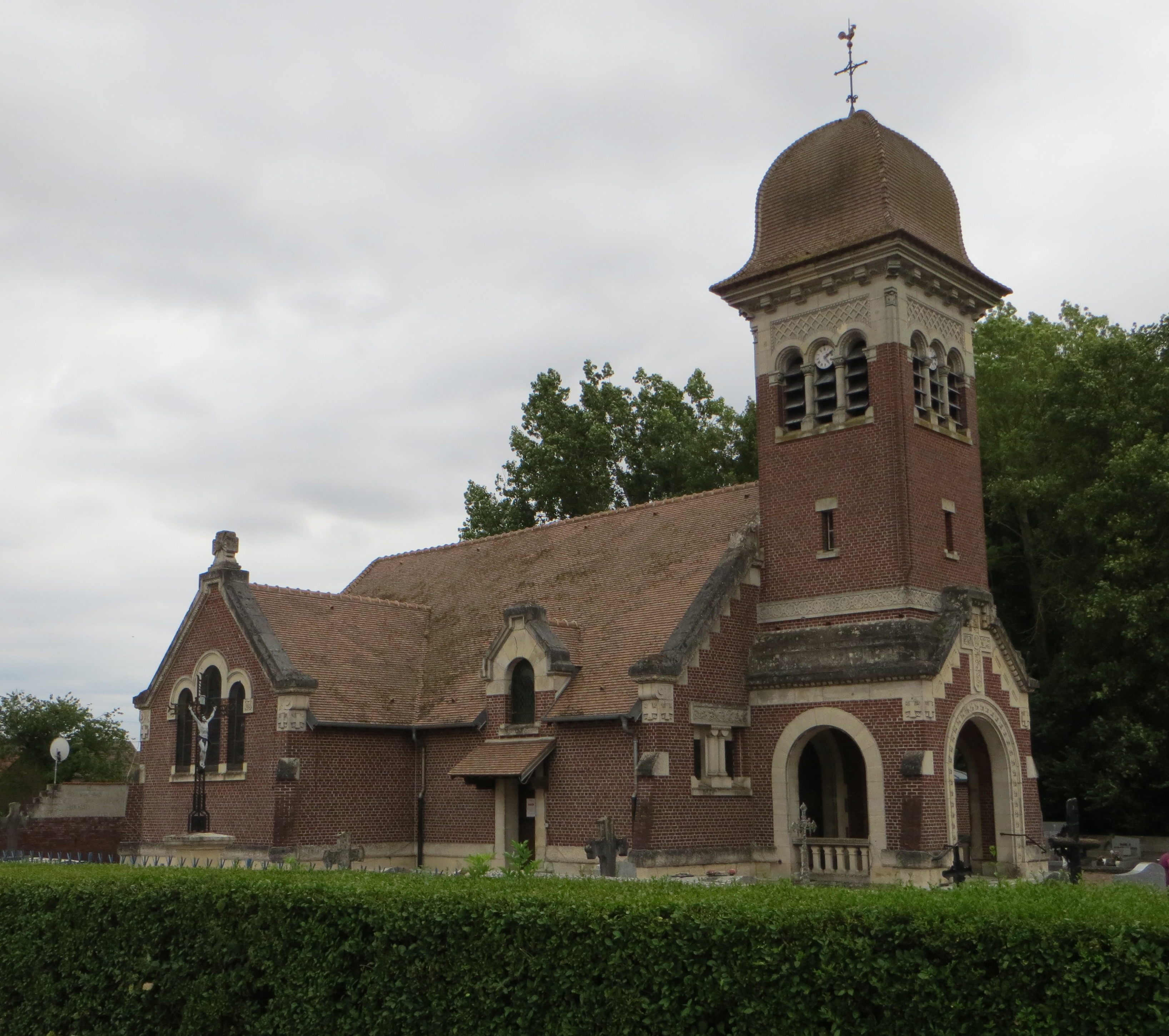 Vue générale de l'église